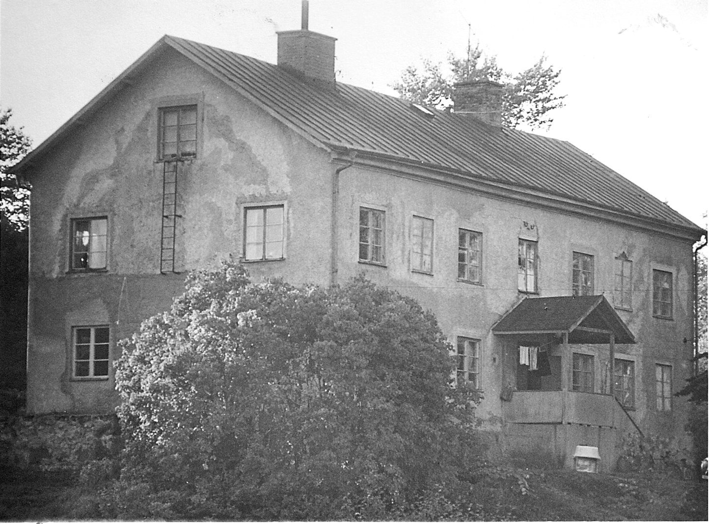 Åbo, arbetarebostad vid Stensholms Fabriks AB. Byggnaden revs 1969. Foto taget 1969.